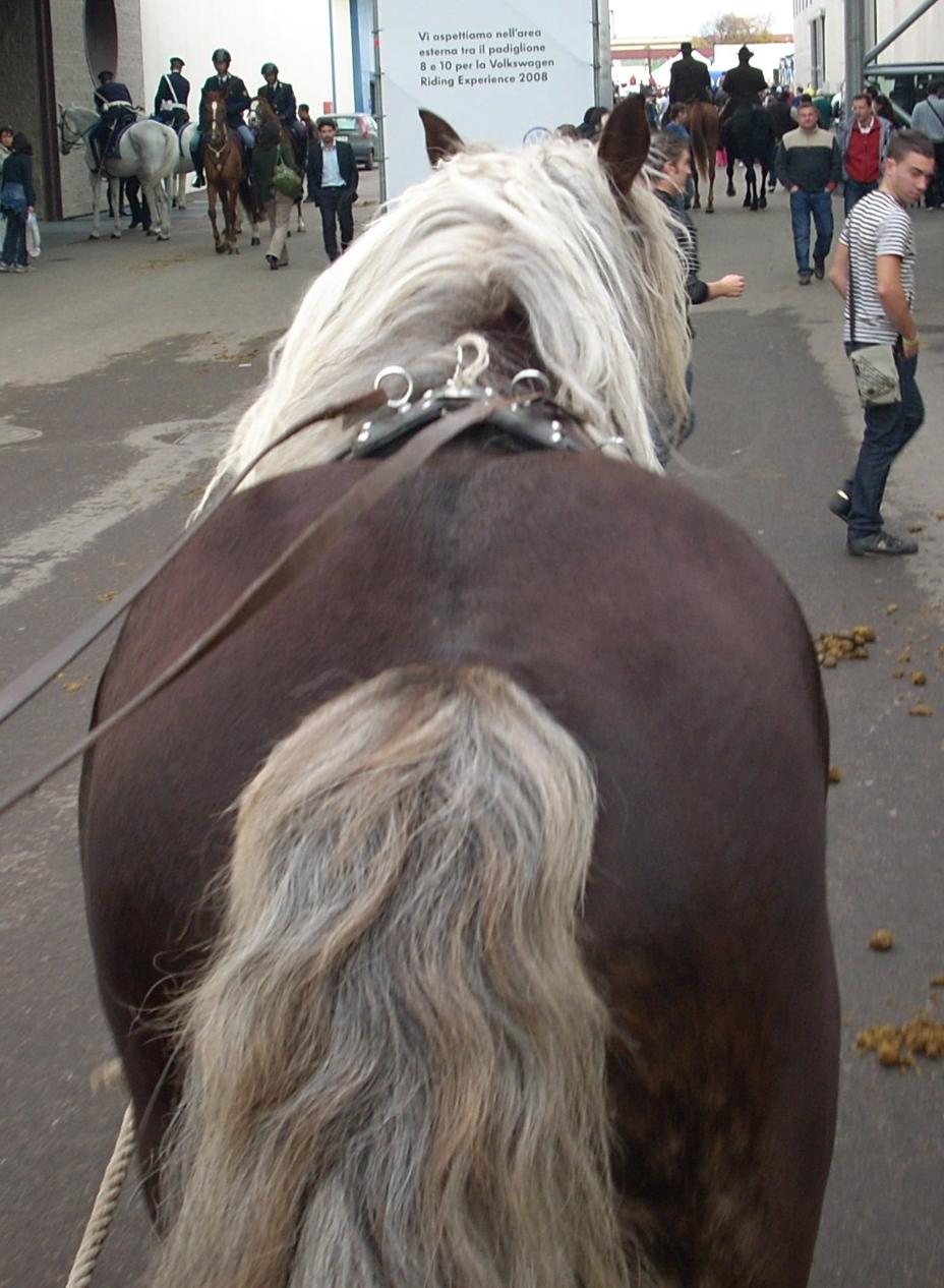 TPR Cavallo Agricolo Italiano, Topolino - addestrato a trainare una slitta